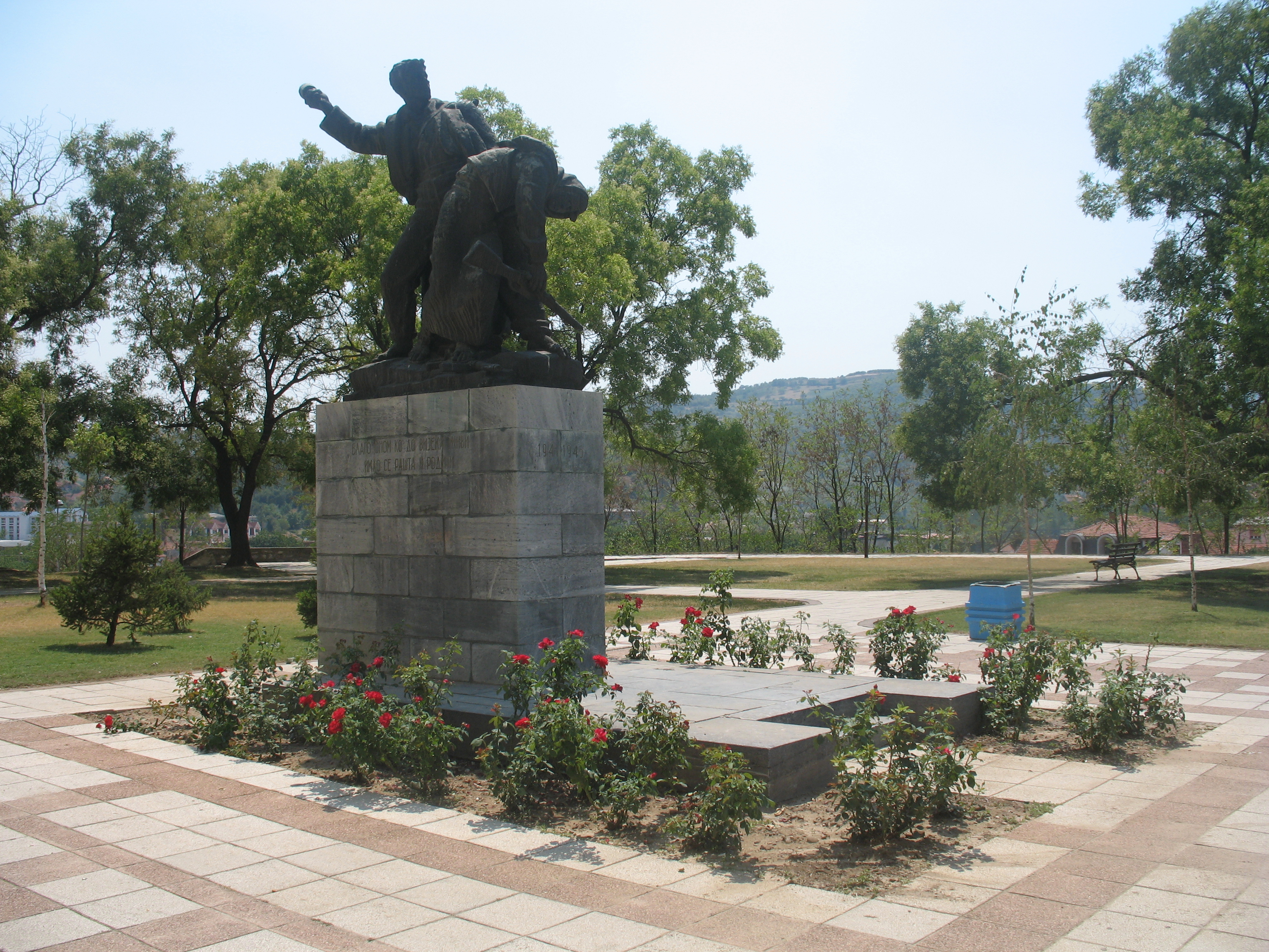 Monument to WWII heroes in Prokuplje